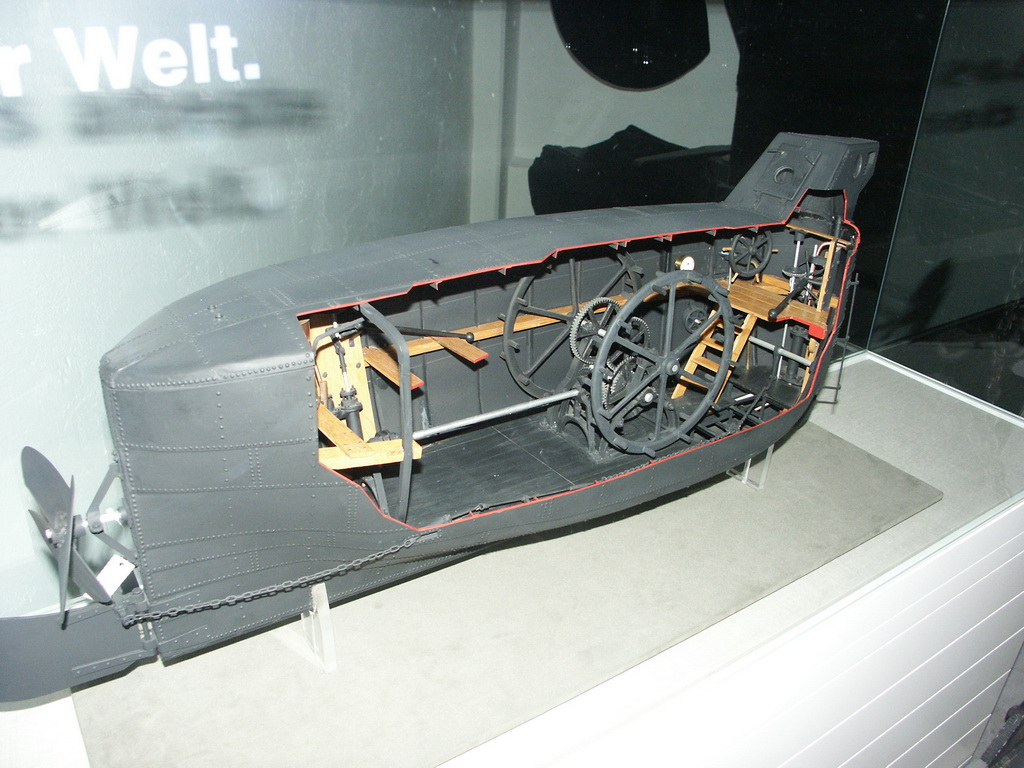 Bundeswehrmuseum Dresden mit Teilen von der NVA Modell des Brandtauchers von Wilhelm Bauer